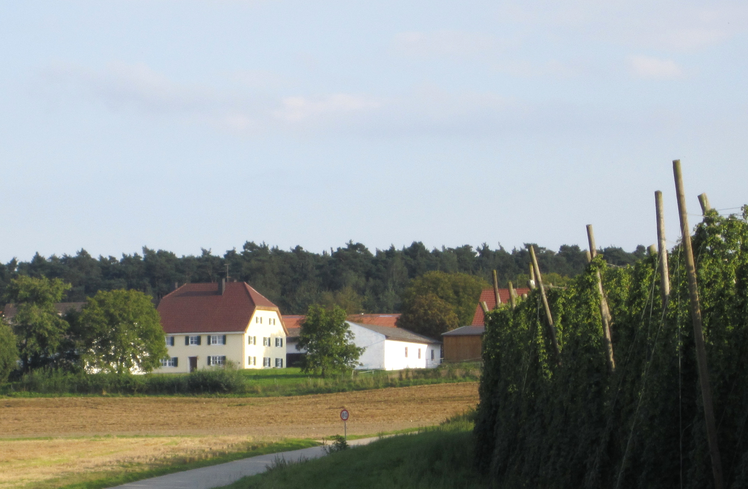 Lina, ein Ortsteil der Stadt Neustadt an der Donau, Landkreis Kelheim, Niederbayern